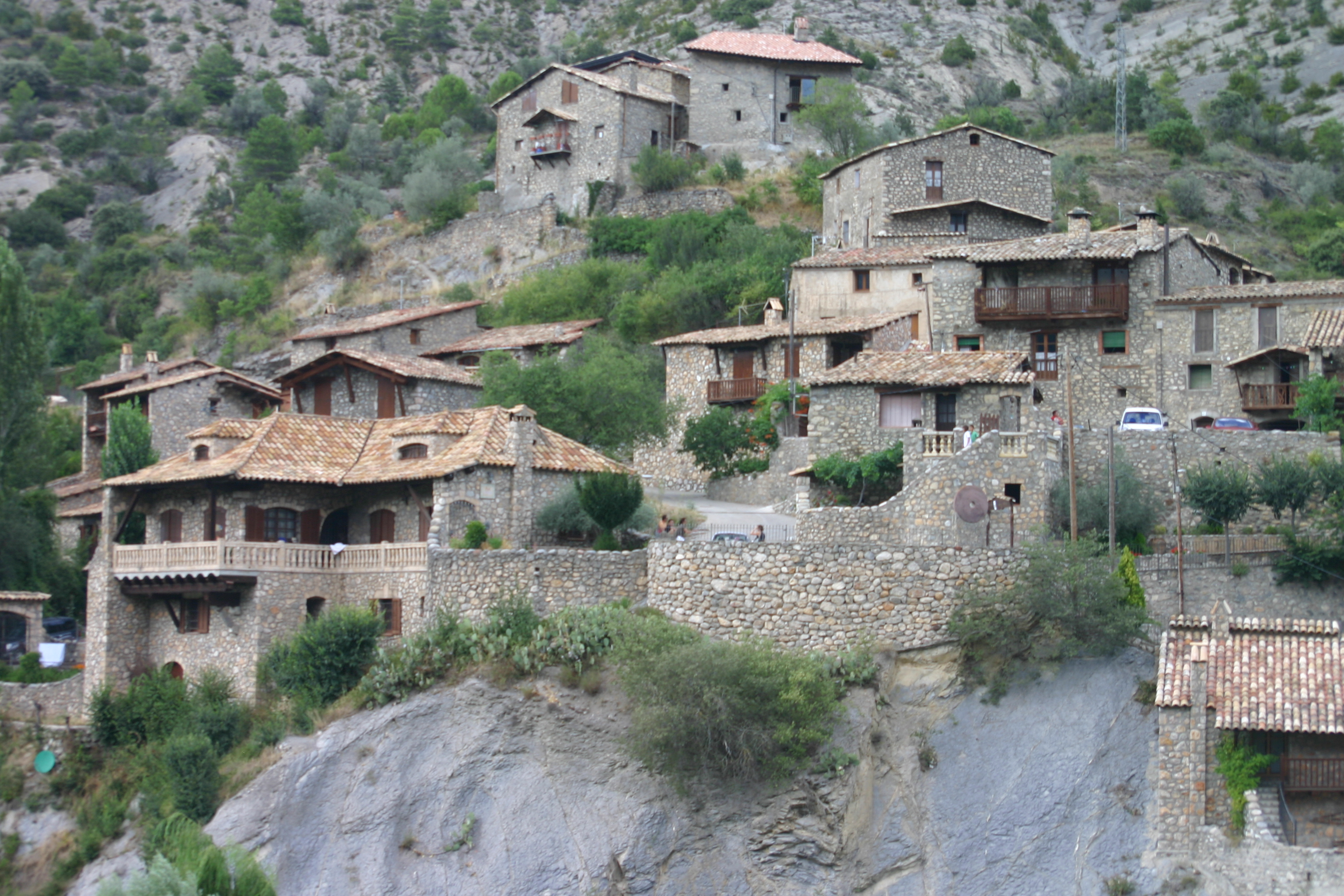 Cabó - Alt Urgell - Lleida - Catalunya